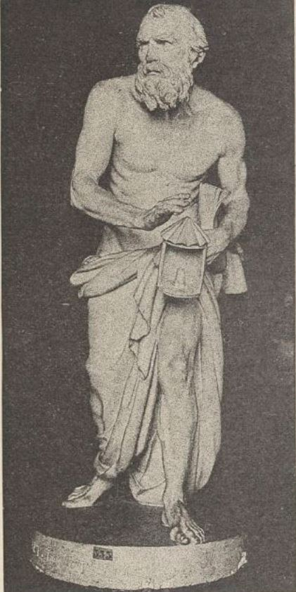 François-Joseph Duret (1729-1816), Diogène cherchant un homme, musée des beaux-arts de Valenciennes, publié dans François Benoit (1870-1947), L'Art français sous la Révolution et l'Empire : les doctrines, les idées, les genres, 1897, p. 367 et 370.